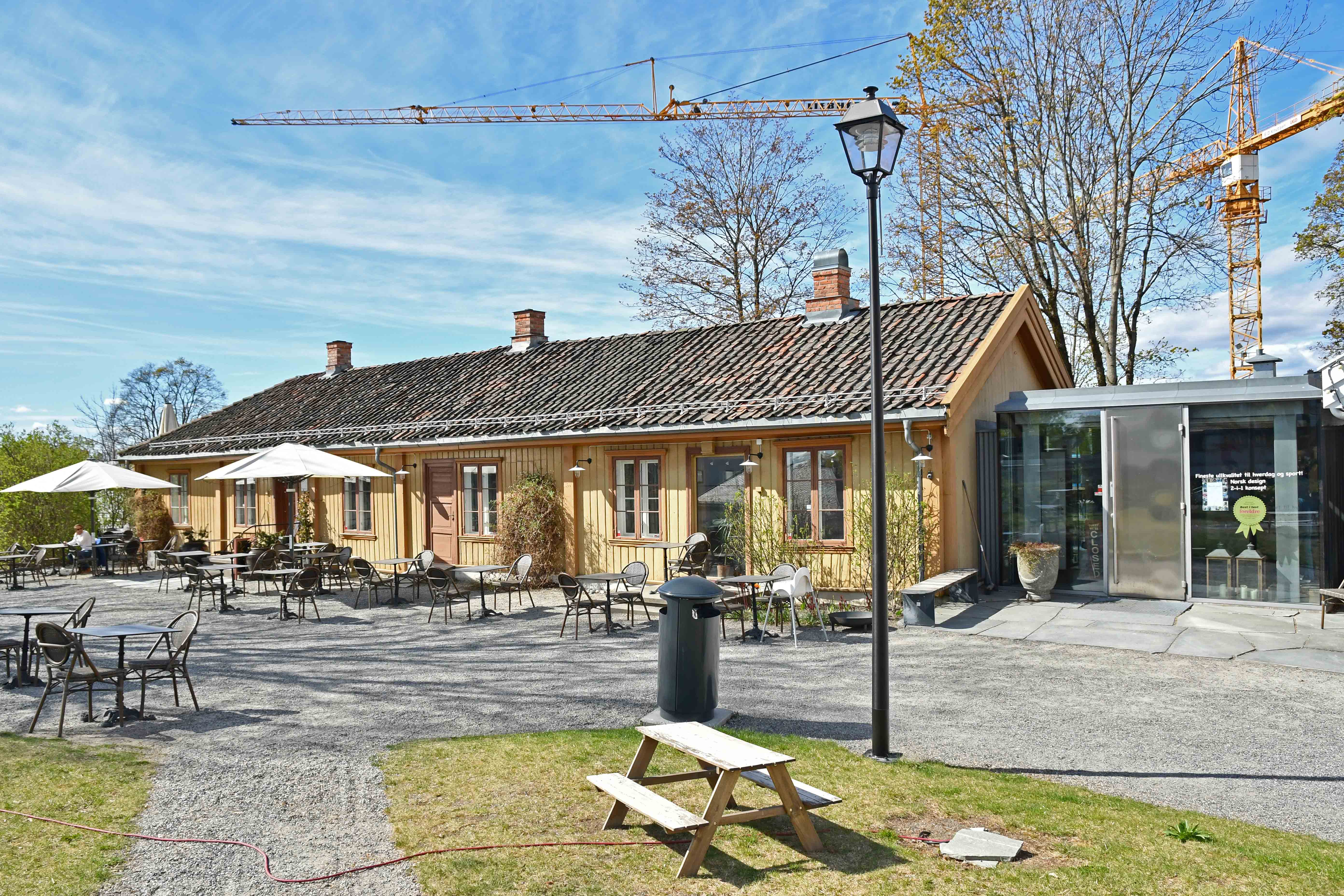 Lilleaker arbeiderboliger, Lilleakerveien 30, Sclägergården hovedbygningen, 1700-tallet, fredet av Riksantikvaren i 1996. I 2020 Sclägergården kafe.